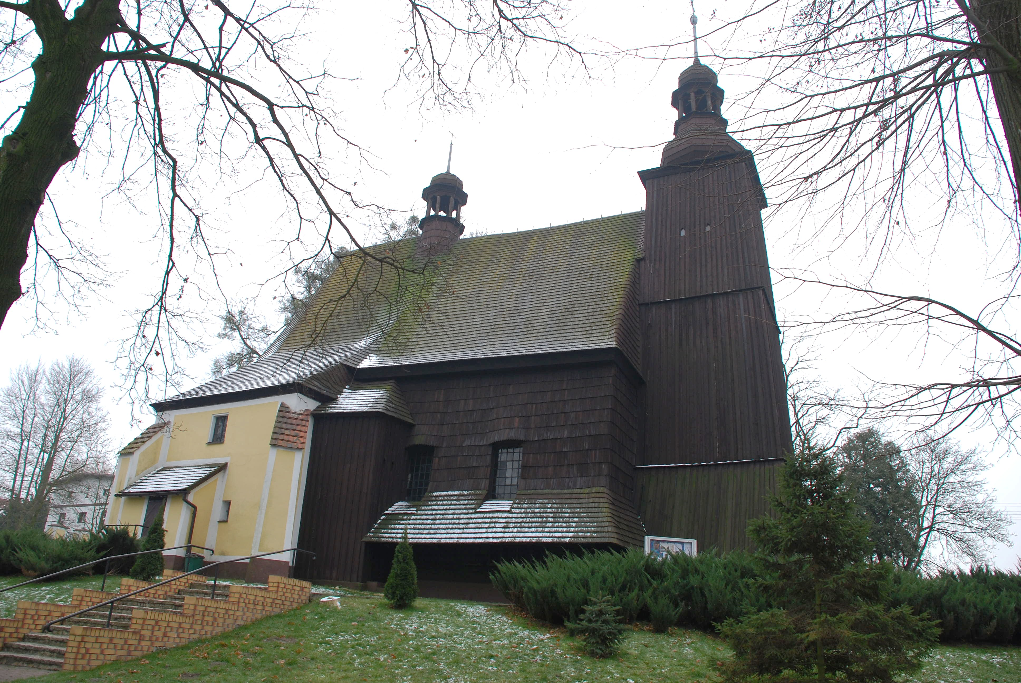 Widok ogólny drewnianego kościoła pw. Wszystkich Świętych w Sierotach (woj. śląskie)